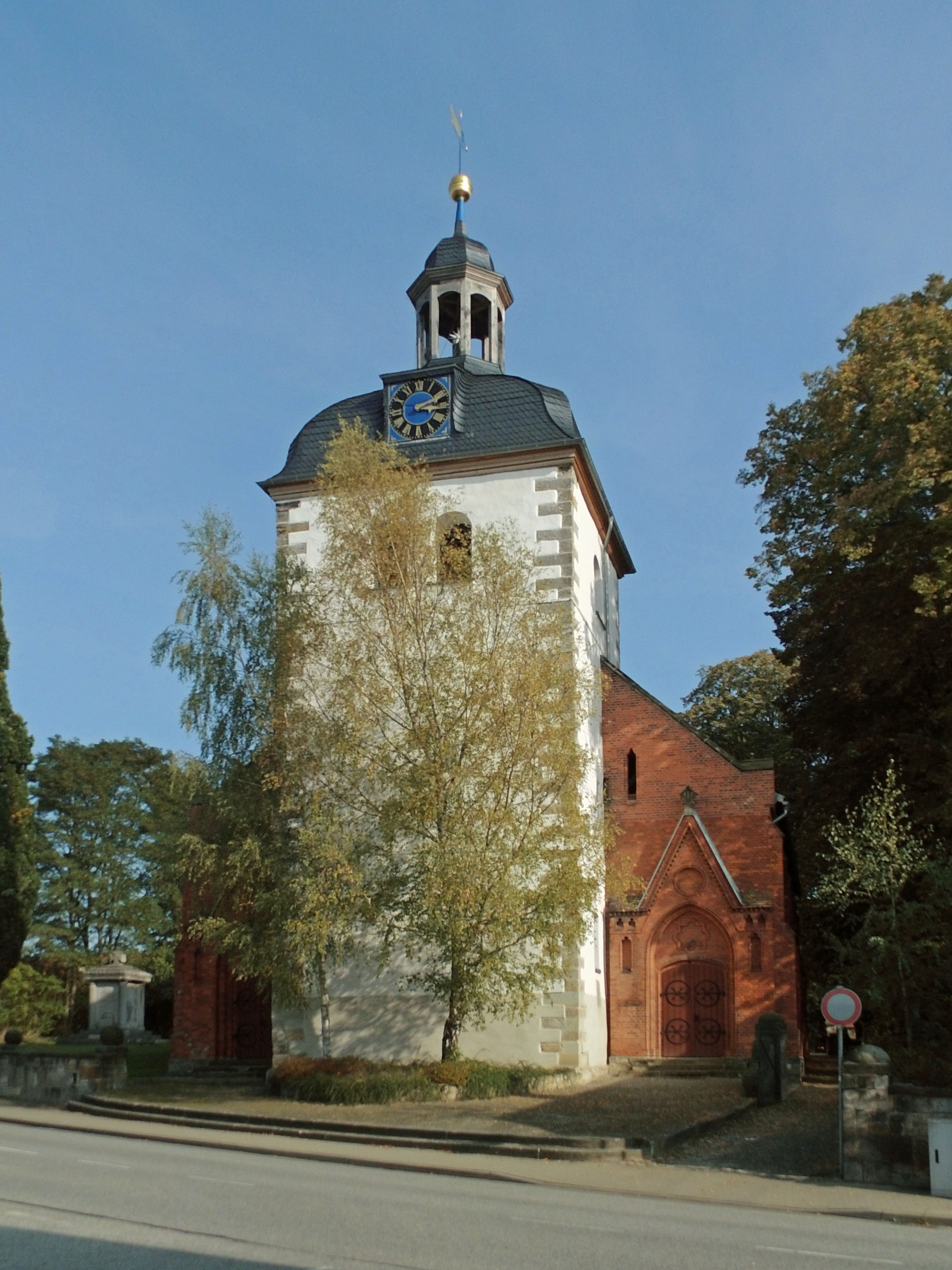 Evangelisch-lutherische St.-Stephani-Kirche in Hornhausen bei Oschersleben.